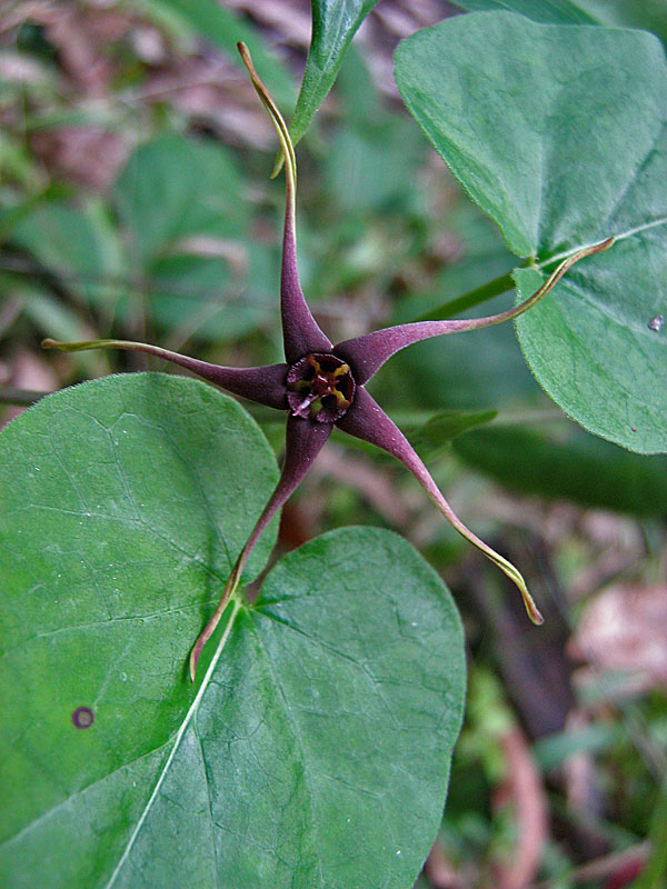 Oxypetalum harleyi (Fontella & Goyder) Farinaccio